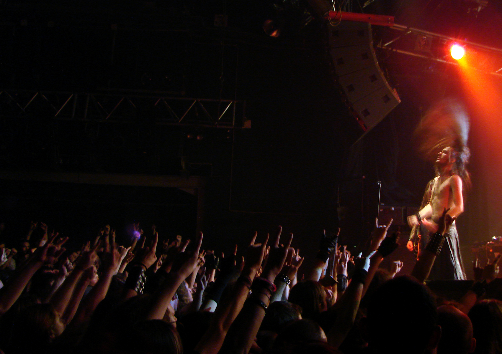 Finntroll en concert à la Locomotive, à Paris, pendant le Heidenfest Tour, le 9 Novembre 2008.